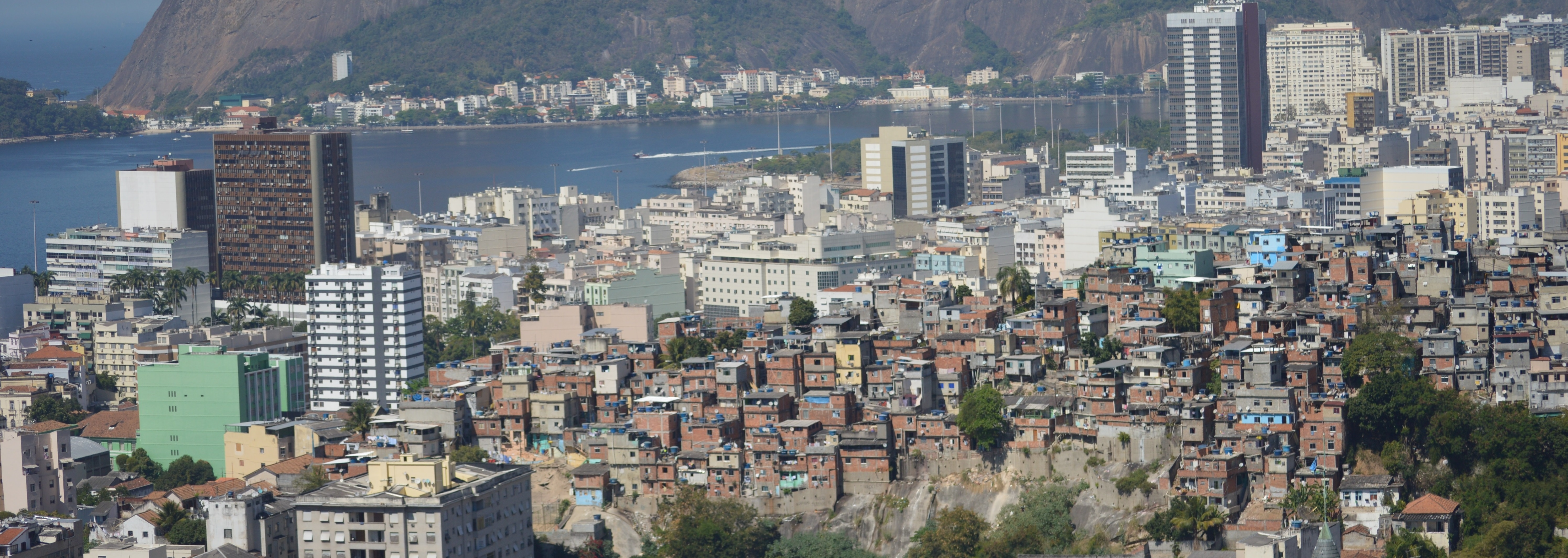 近代都市リオの低所得者層居住区